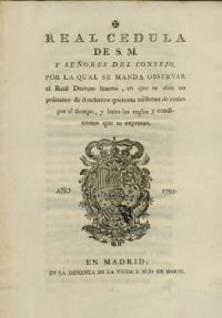 Real cedula de S.M. y señores del Consejo permitiendo a los que tengan posadas en el Reyno puedan comprar todo género de comestibles á qualquier hora del dia, con tal de que observen lo dispuesto en los capítulos insertos de la nueva instruccion de posadas, con lo demas que se previene